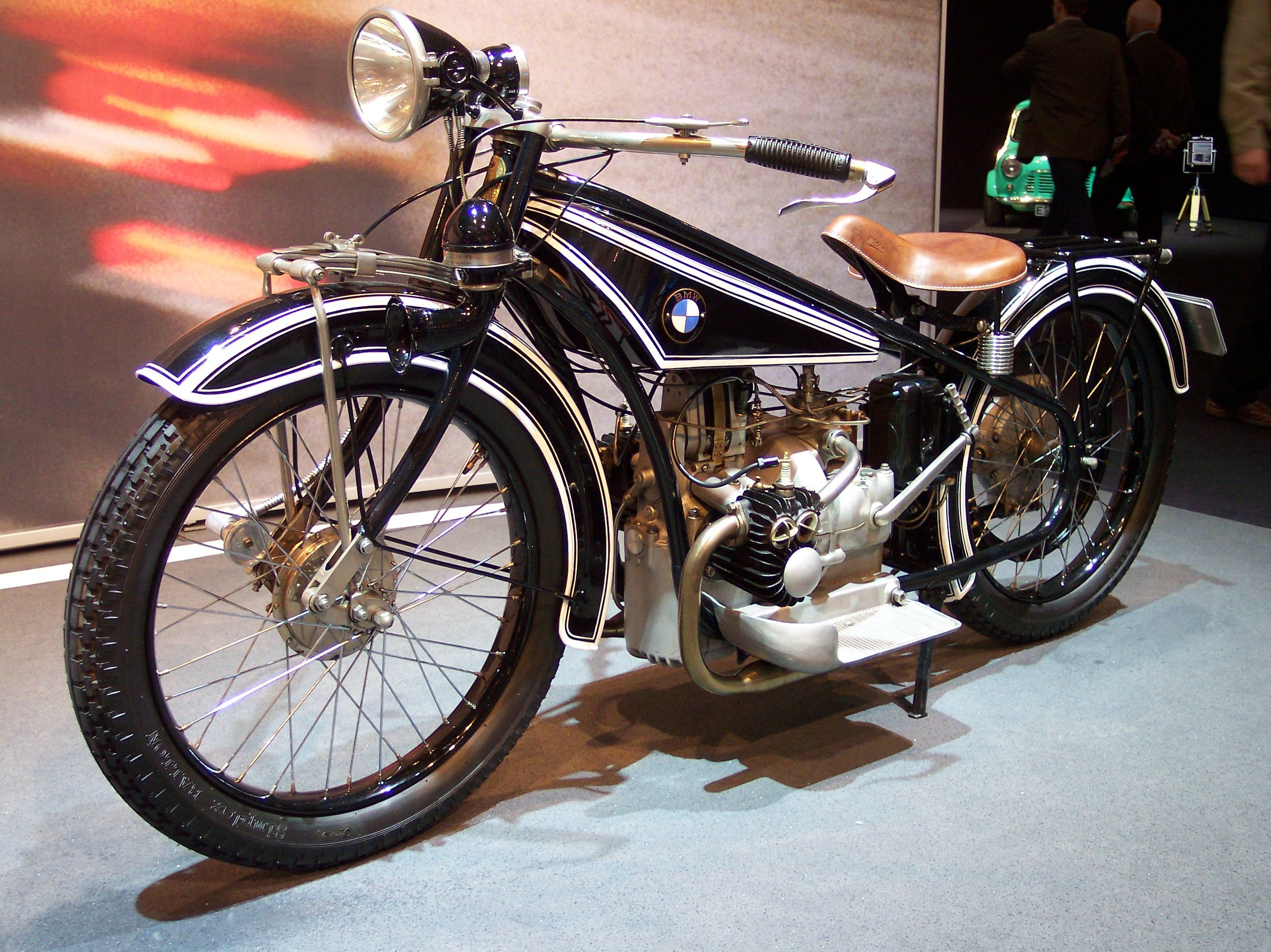 BMW R32